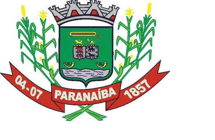 Brasão de Paranaíba